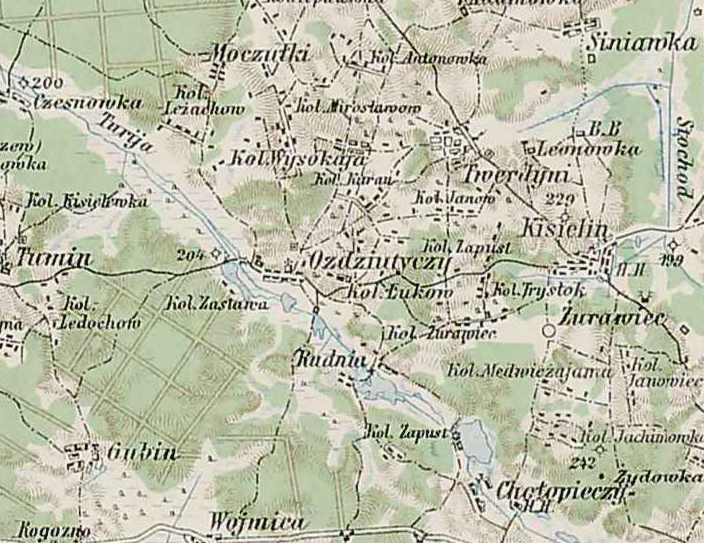 Kisielin i okolice, mapa topograficzna, 1910